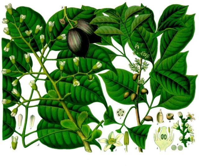 Elemibaum. Canarium commune L. A Zweig mit Blatt und Blüthenrispe, etwas verkleinert; B Früchte, natürl. Grösse; 1 Blüthe, desgl.; 2 u. 3 Kronblätter von verschiedenen Seiten, desgl. Icica Icicariba D. C. C Zweig mit Blüthen und Früchten, etwas verkleinert; 4 Blüthentraube, vergrössert; 5 Blüthe, desgl.; 6 dieselbe im Längsschnitt, desgl.; 7 Staubgefässe, desgl.; 8 Pollen, desgl; 9 Fruchtknoten im Querschnitt, desgl.; 10 Frucht im Quer- und Längsschnitt, desgl.